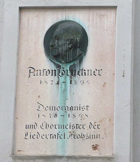 Gedenktafel für Anton Bruckner - Alter Dom in Linz